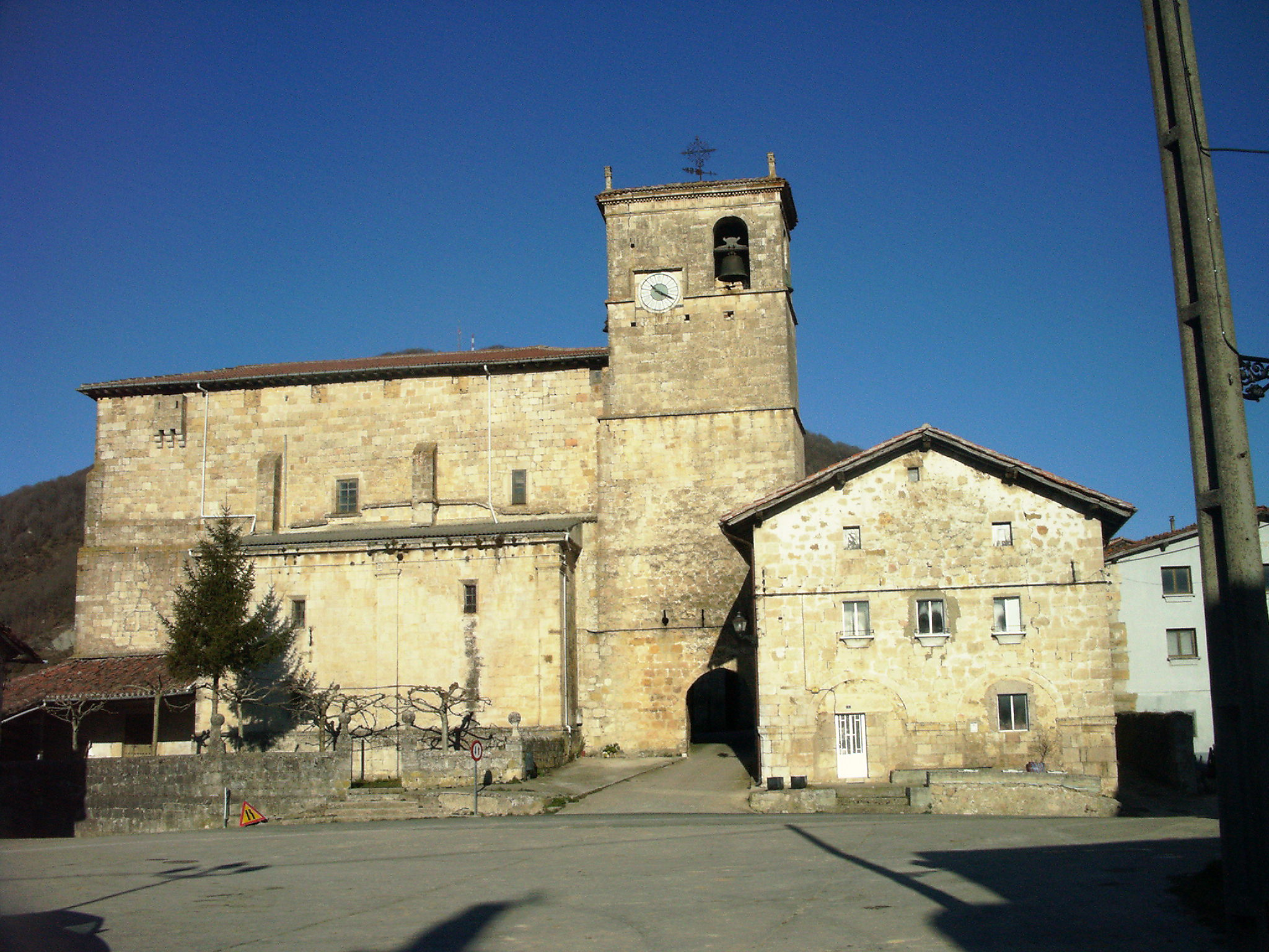 Kontrastako eliza.